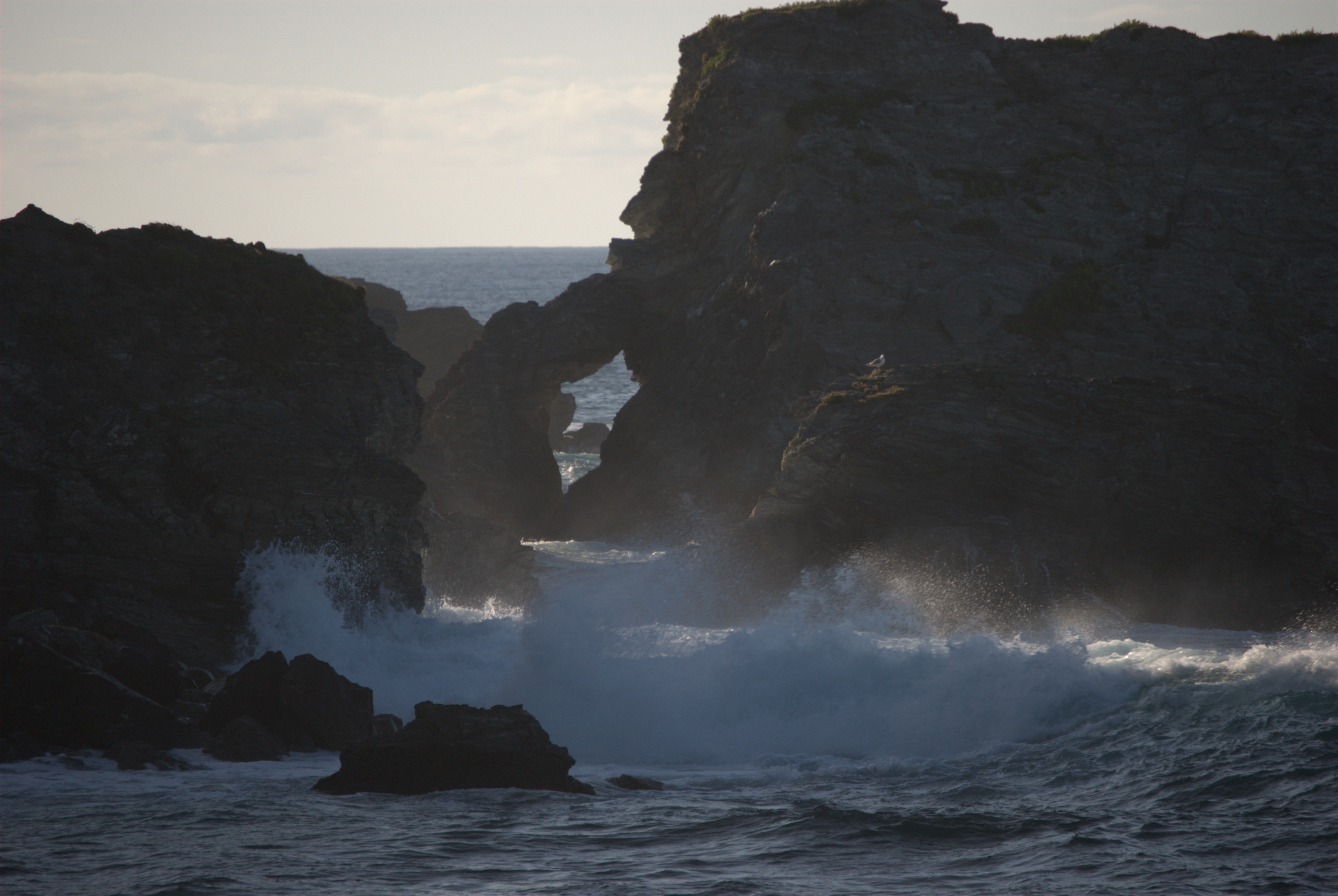 Mazorgán, Céltigos, Ortigueira, Galiza